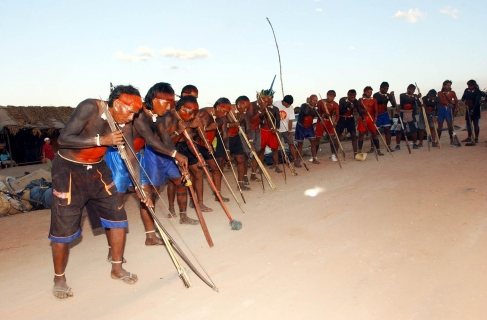 Xavantes (Marãiwatséde) feiern die Rückgabe ihres Landes.jpeg Die Agência Brasil erlaubt die Verbreitung ihrer Fotos unter der GNU-FDL, so lange die Herkunft mit Agência Brasil und dem Namen des Fotografen angegeben ist.